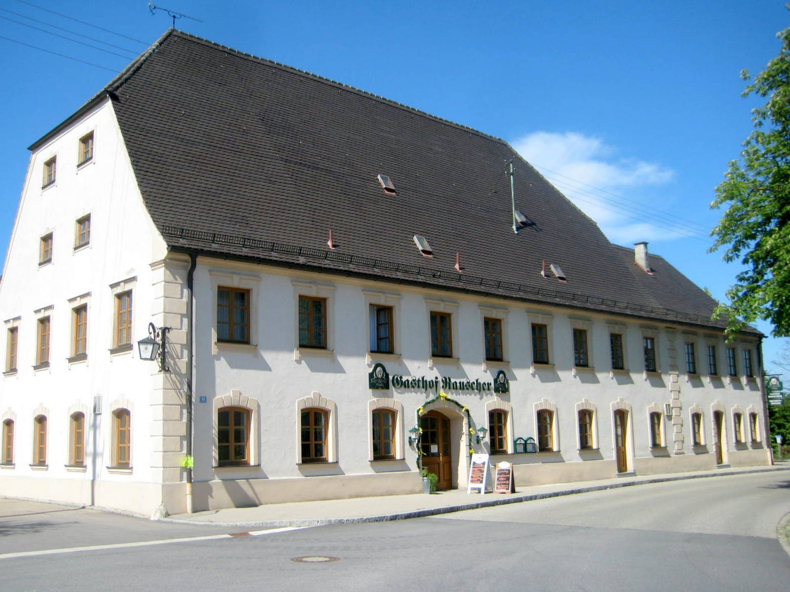 Münchsmünster ist eine Gemeinde des LKr. Pfaffenhofen a.d. Ilm.